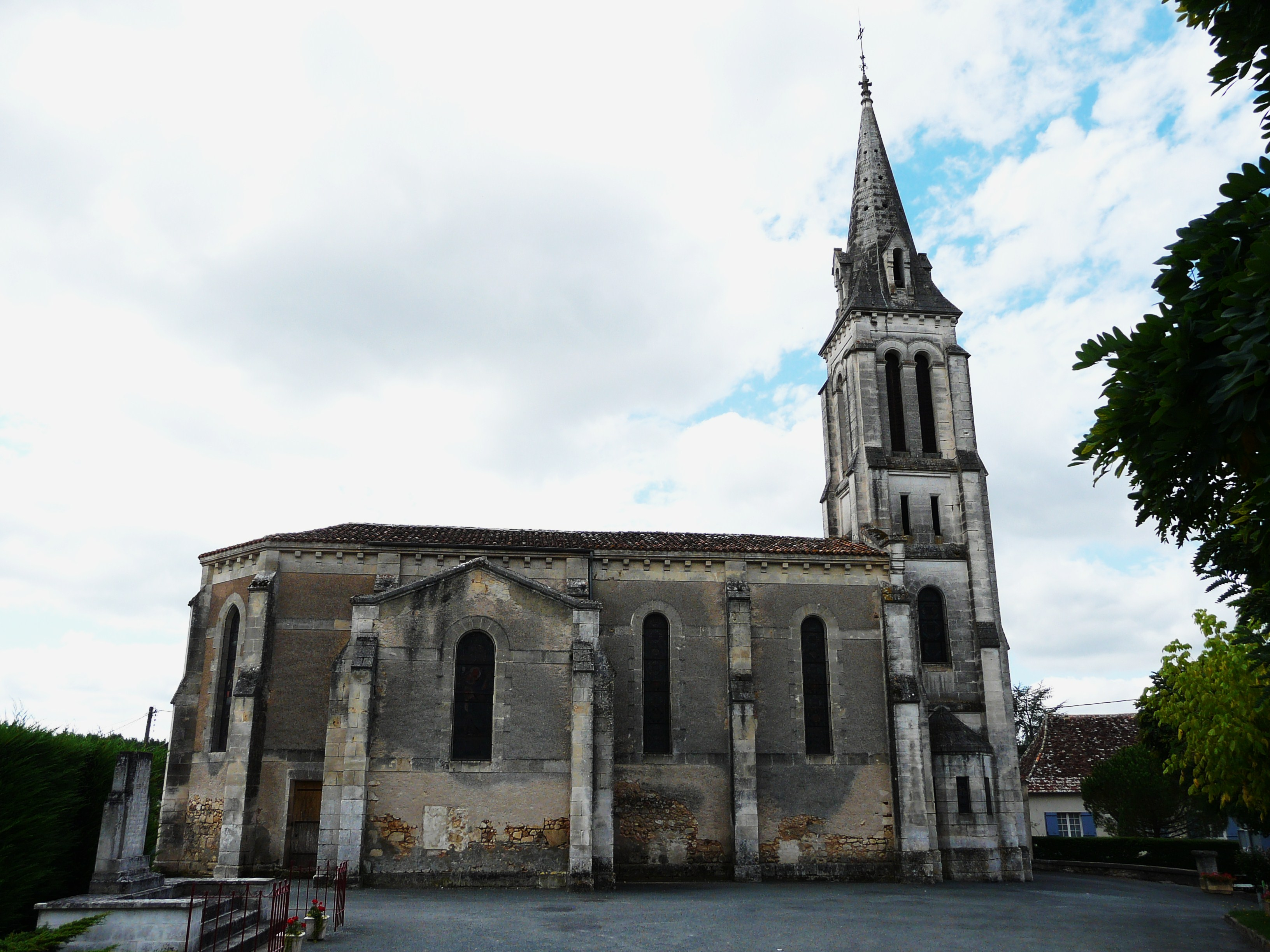 Église Saint-Laurent, Les Lèches,Dordogne